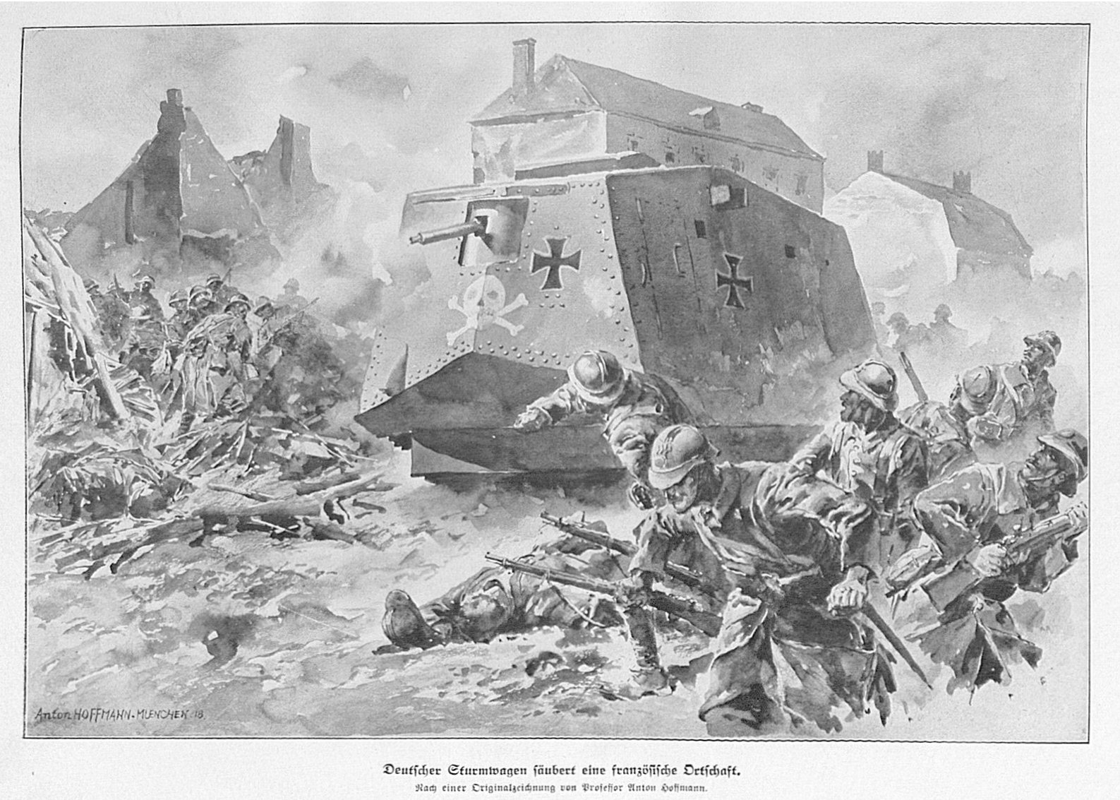 Illustration aus der Wochenzeitung Illustrierte Geschichte des Weltkrieges.